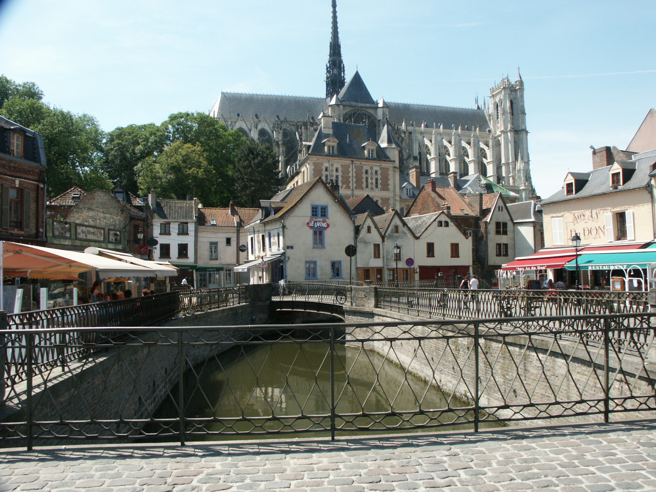 Amiens, Place du Don